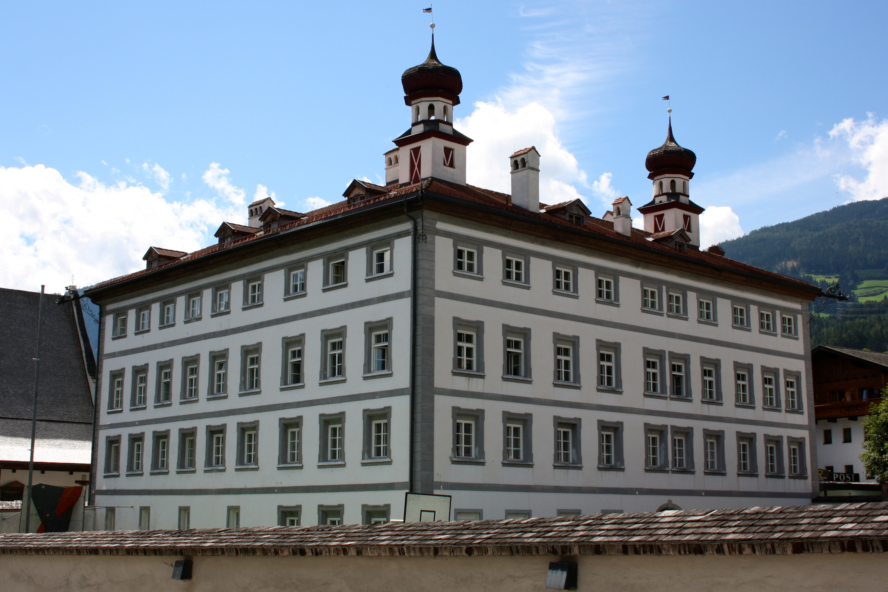 Bubenburg (Fügener Schloss) in Fügen (Zillertal).